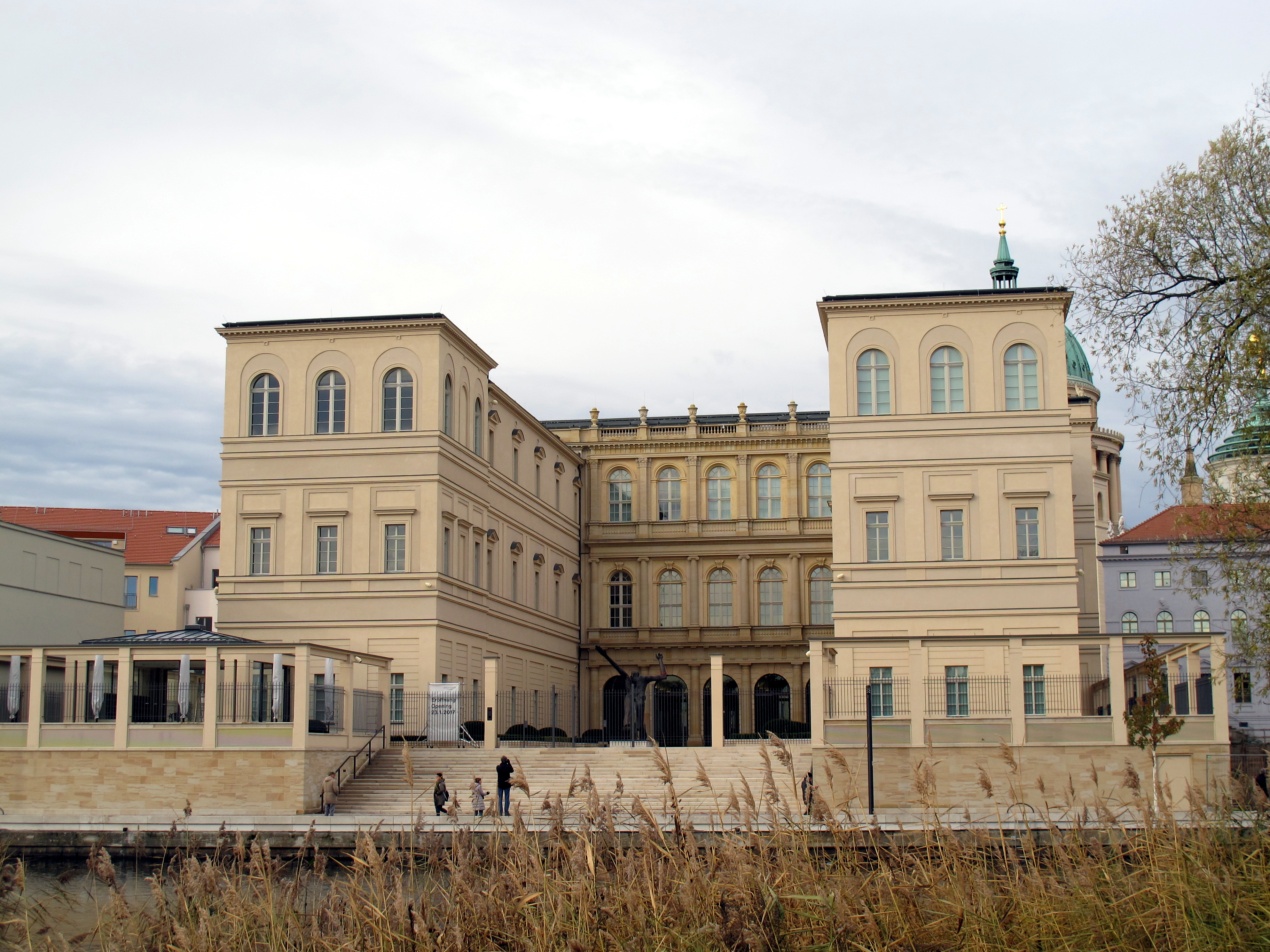 Das Museum Barberini von der Freundschaftsinsel aus fotografiert